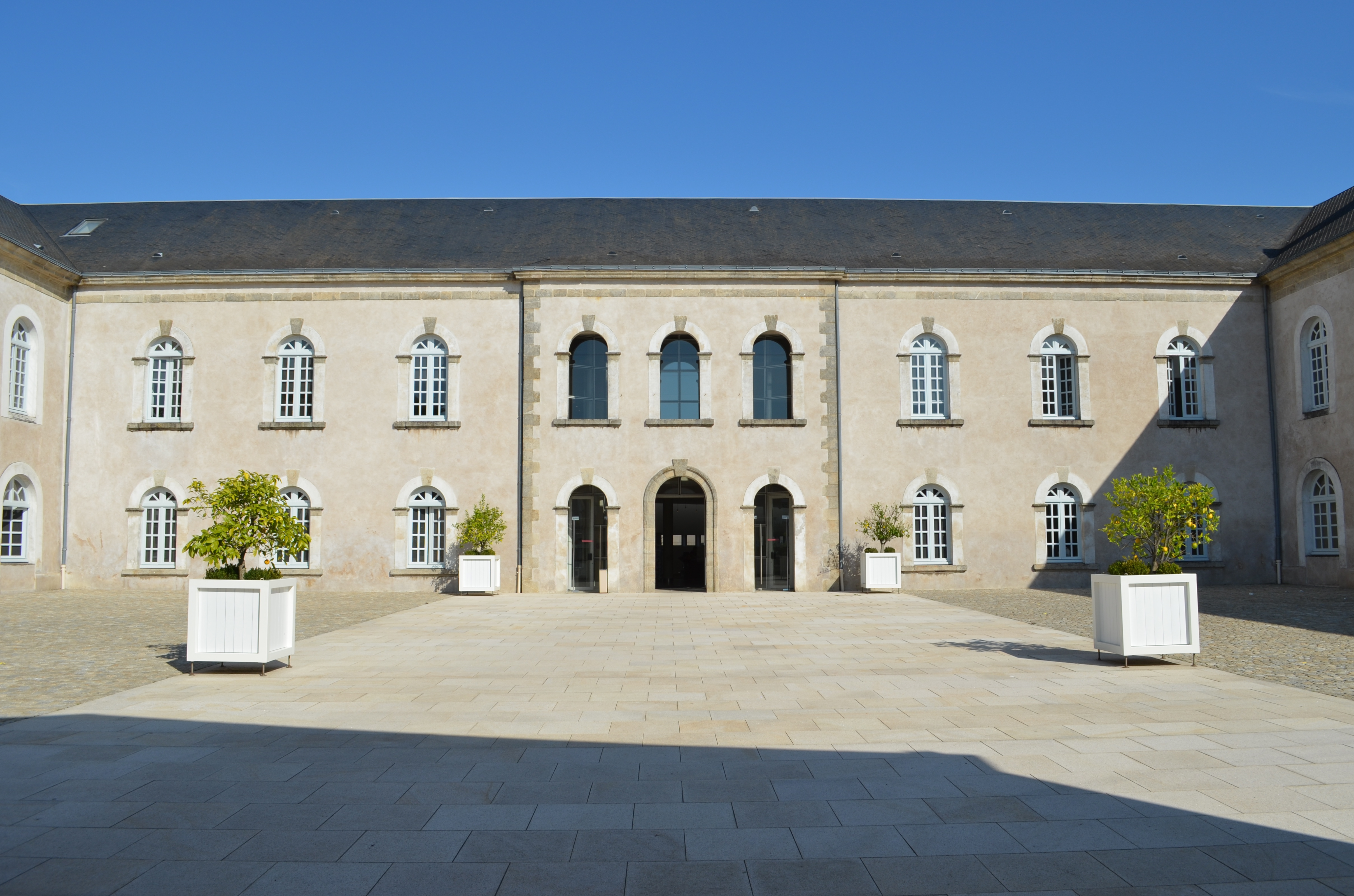 Ancien Hôpital (actuel Conseil Général de Vendée) - La Roche-sur-Yon .